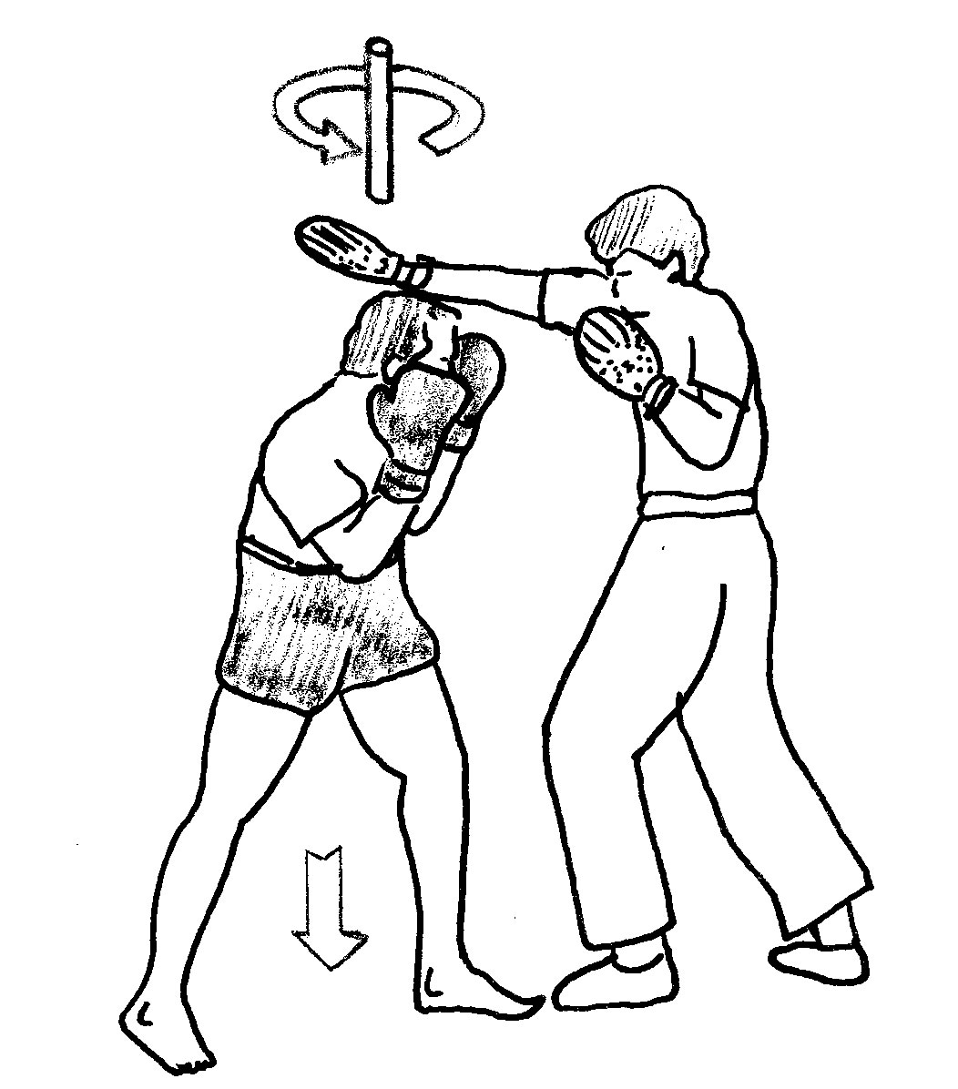 slip2.jpg